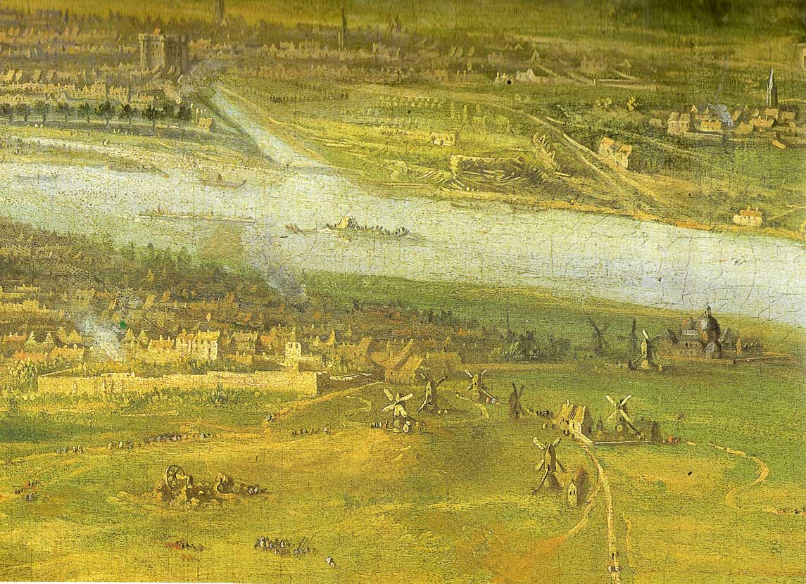 Blocus de Paris en l'année 1649, détail montrant au premier plan la Plaine d'Ivry, le faubourg Saint-Marcel et en arrière-plan, le faubourg Saint-Anthoine et la Bastille.